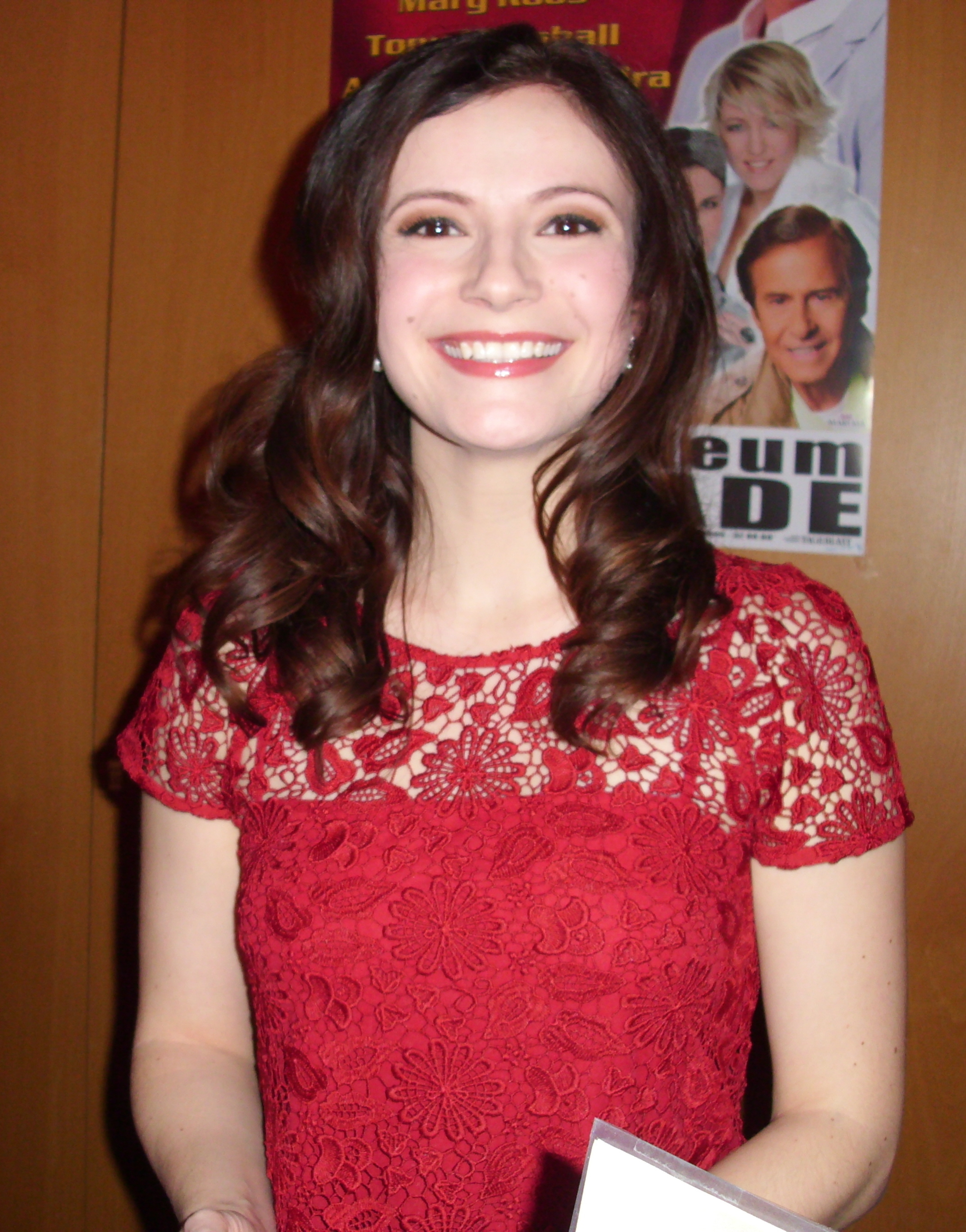 Ilka Wolf bei einer Veranstaltung im Stadeum in Stade am 17. Januar 2014